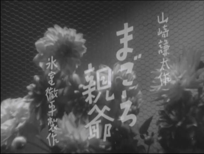 『まごゝろ親爺』、1940年、カットタイトル